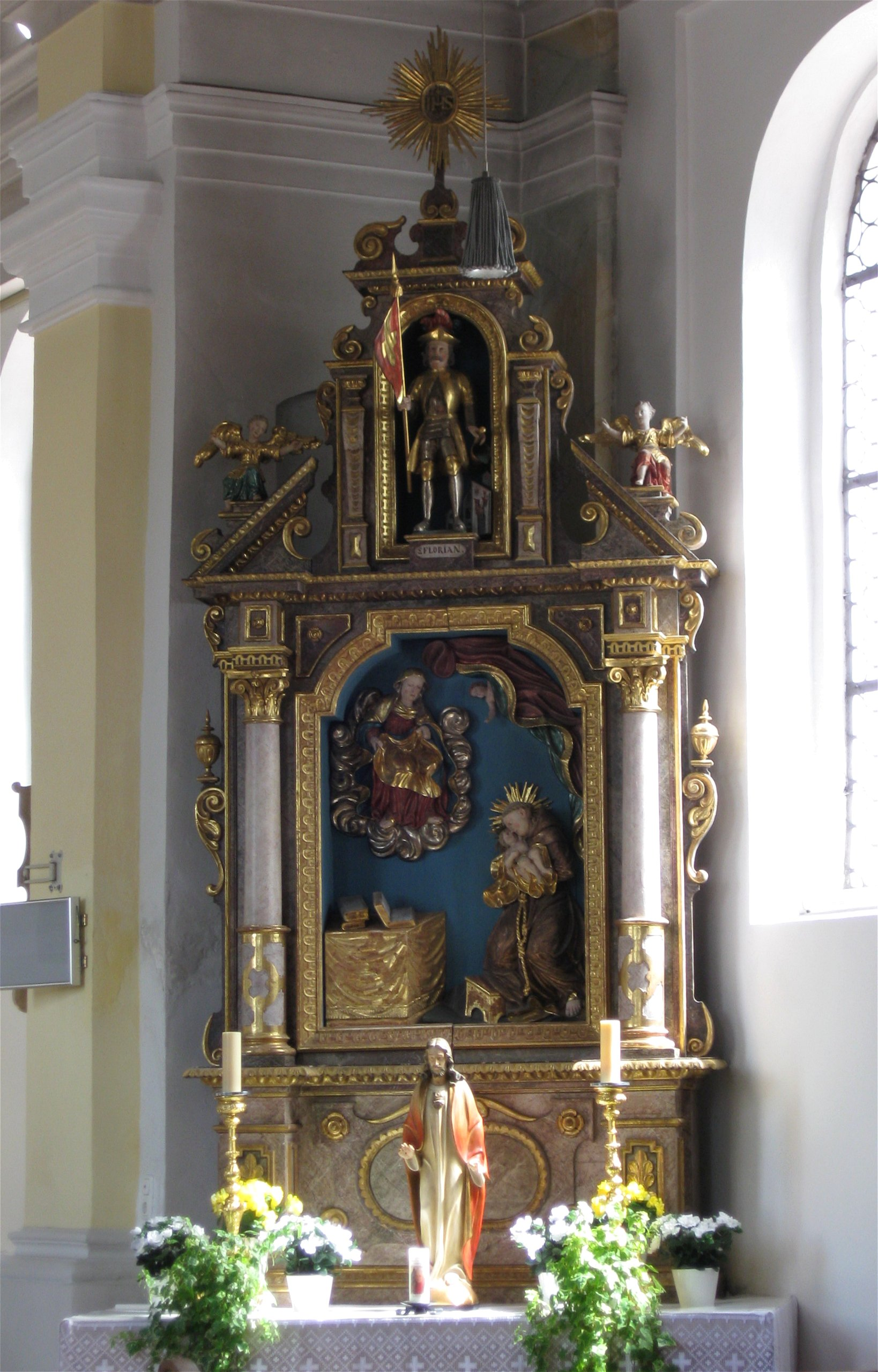 Seitenaltar, Katholische Pfarrkirche Hl. Kreuz, stattlicher Barockbau, 1701-1723 von Johann Georg Ettenhofer erbaut; mit Ausstattung.